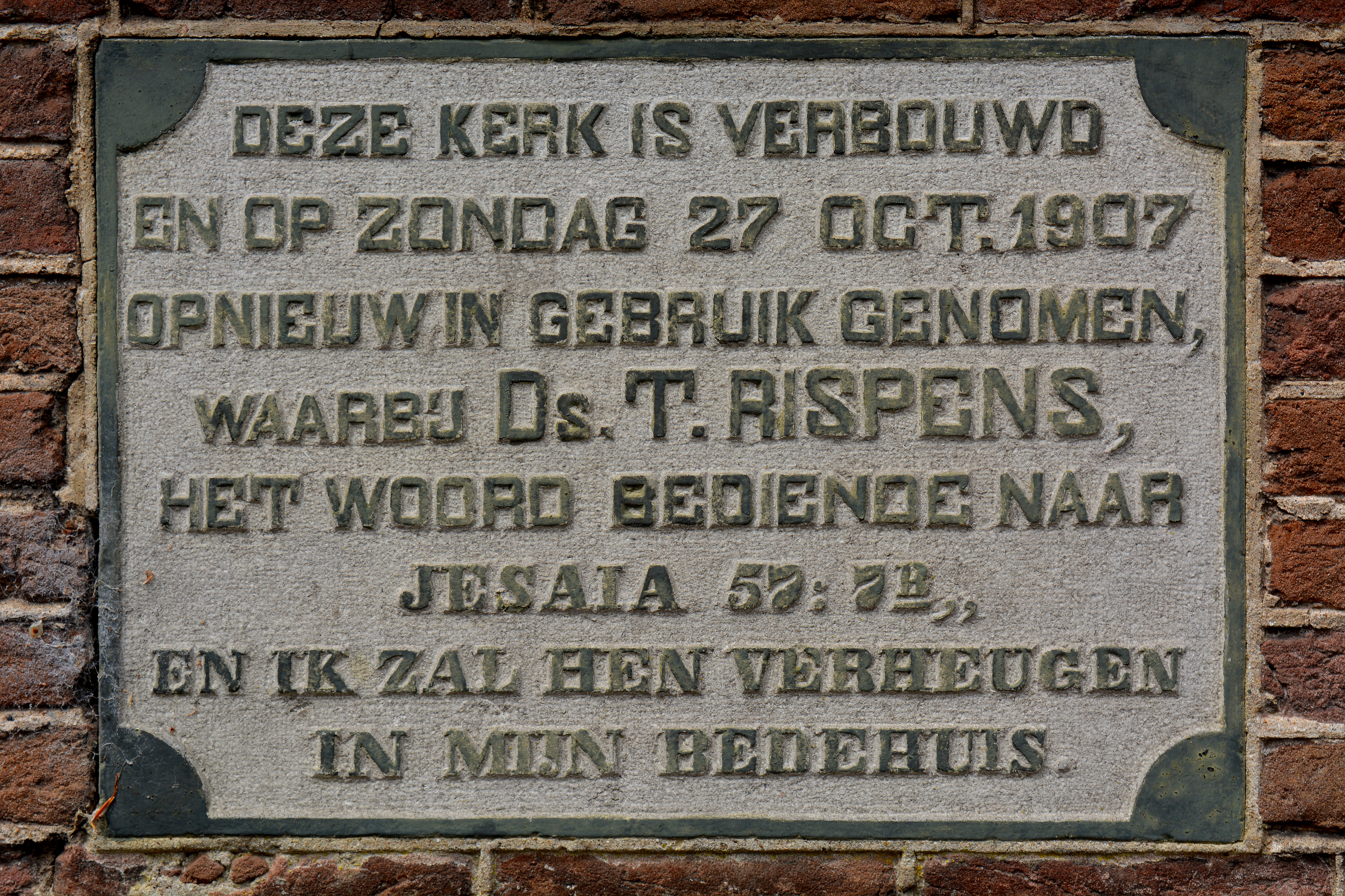 Oentsjerk, Ontmoetingskerk, gevelstien ta oantinken fan de útwreiding fan de tsjerke yn 1907.